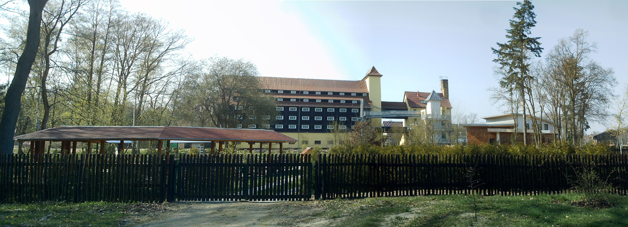 Die Forstsamendarre Jatznick ist eine von neun Samendarren in Deutschland